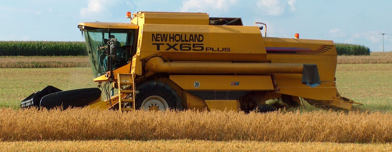 New Holland TX 65 Plus beim Dreschen von Hafer